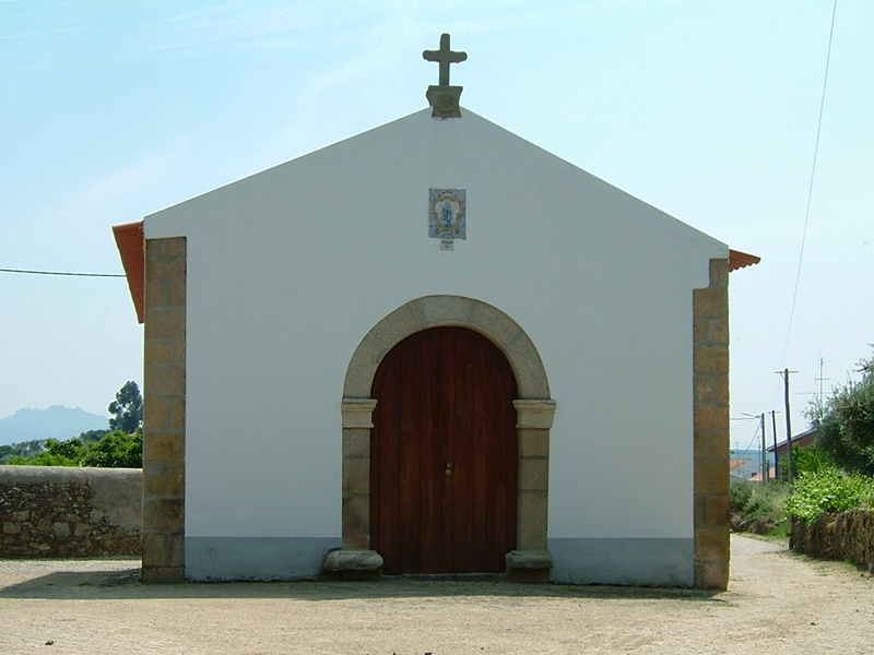 Capela de Santo António - Proença-a-Velha (Fachada Principal)